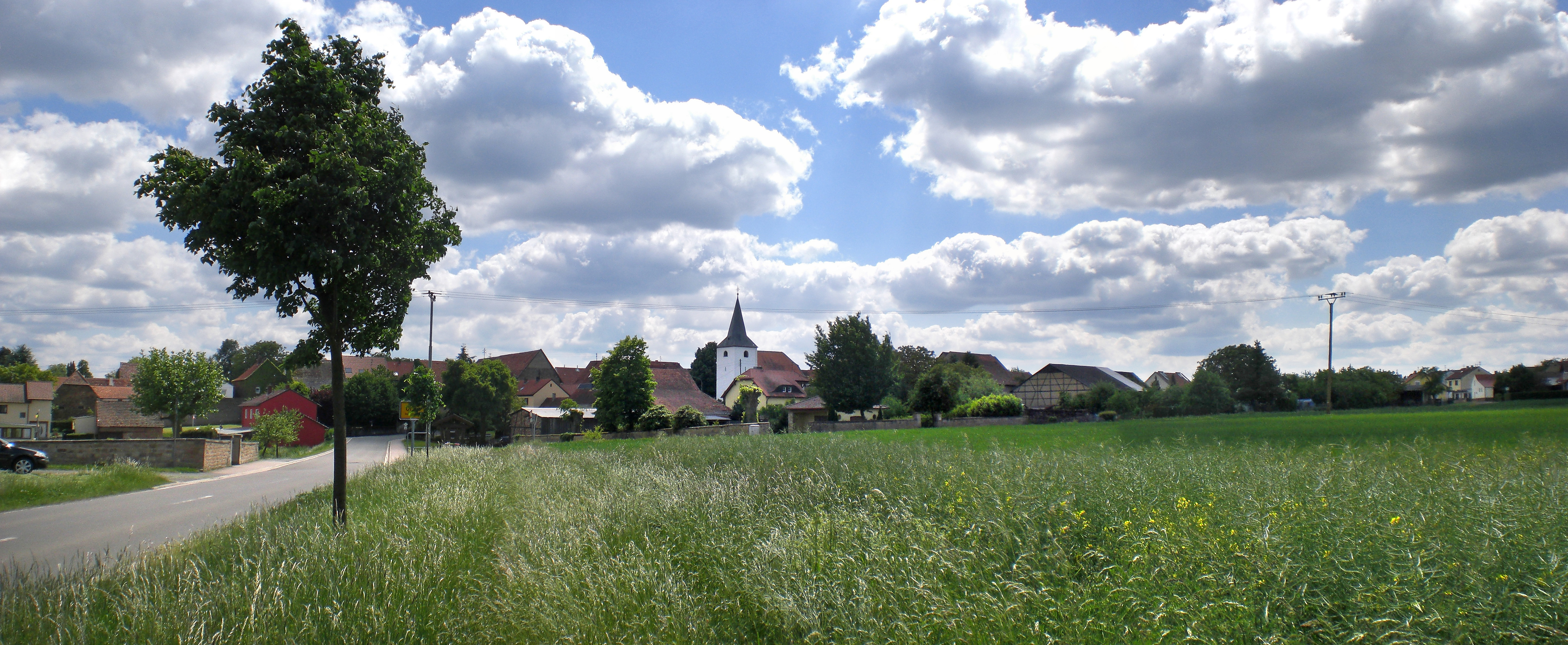 Ortsbild von Orbis, bei Kirchheimbolanden, eingangs von Norden